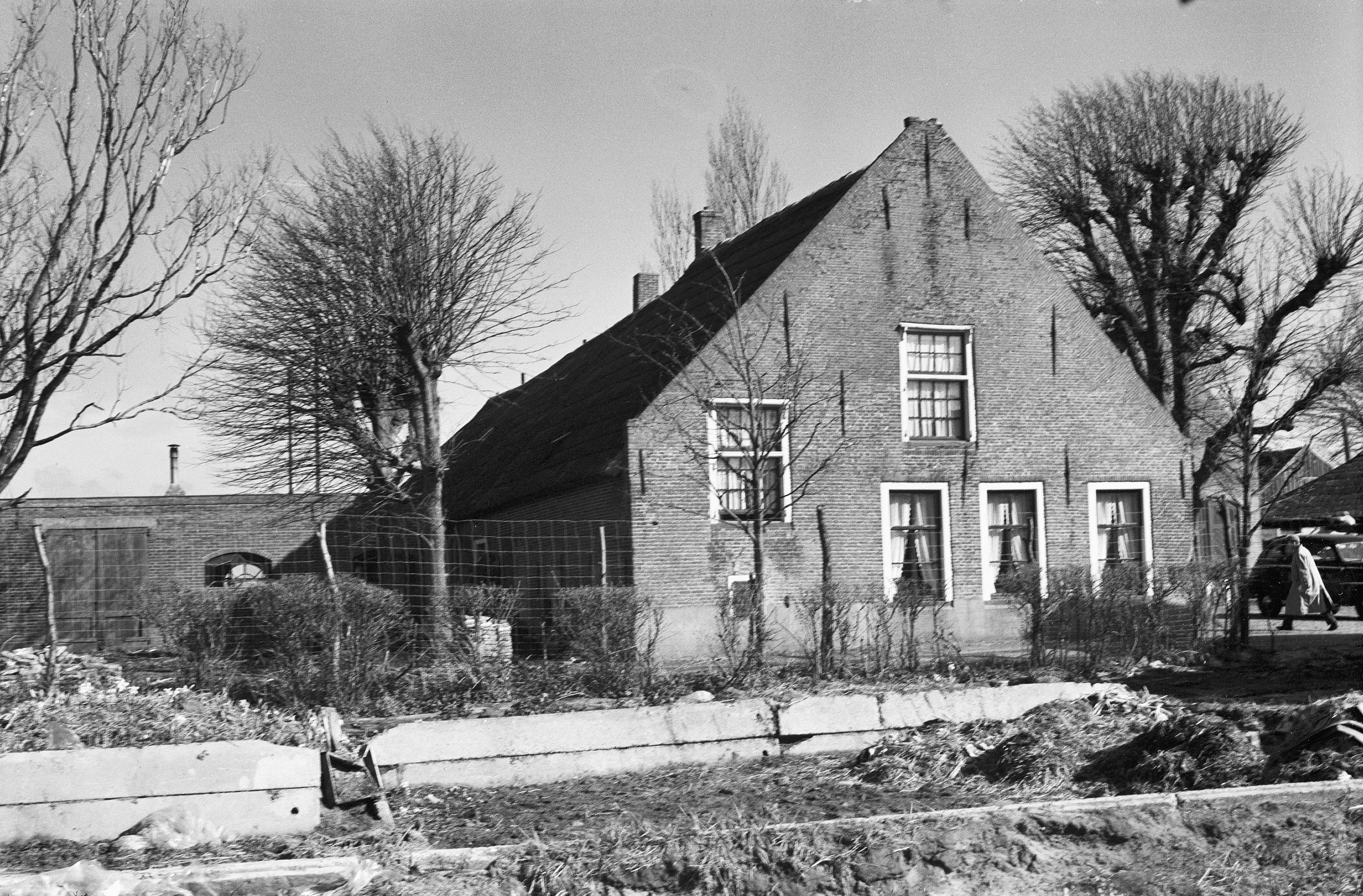 Haaswijk: voorgevel